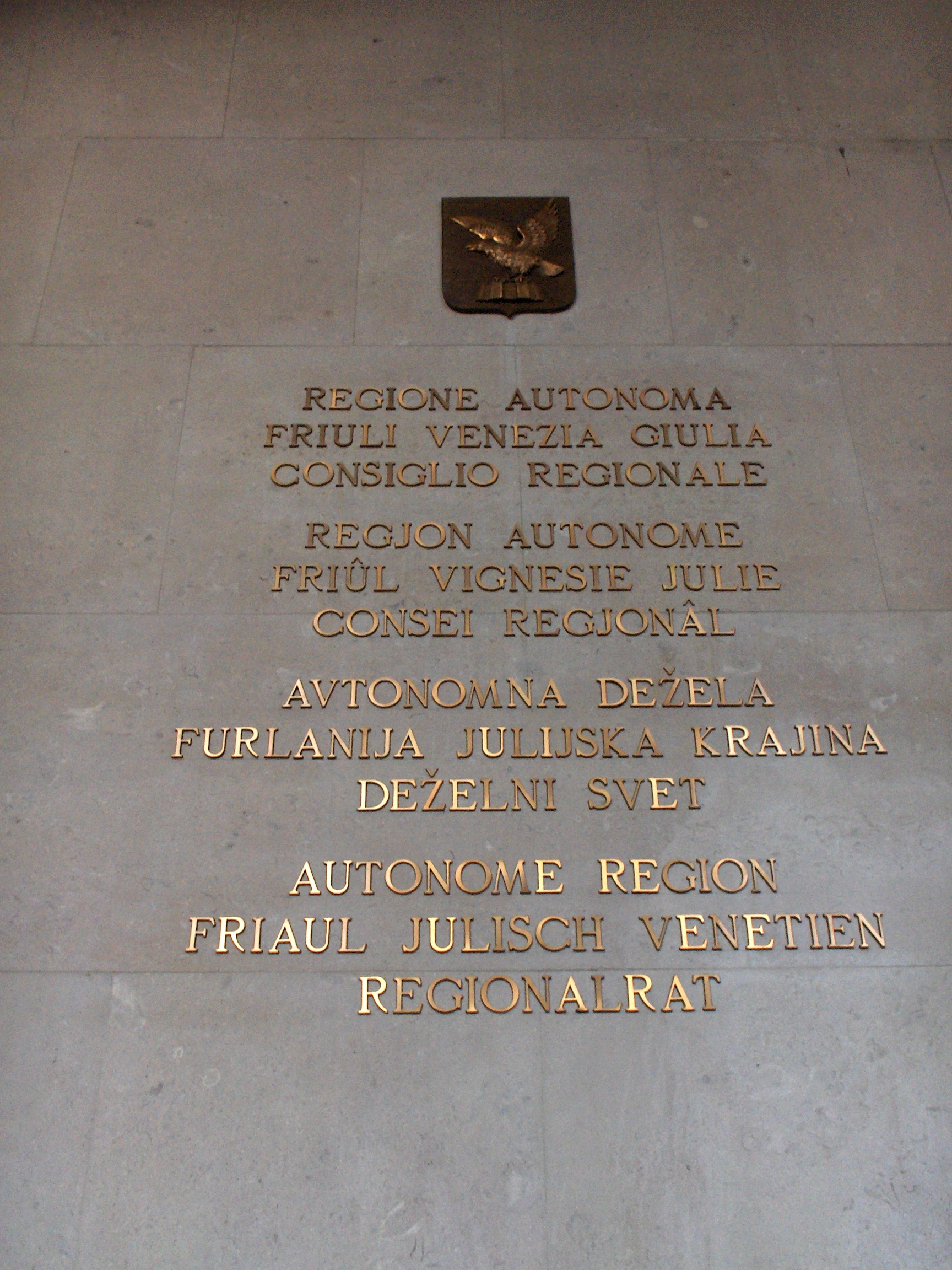 Friuli-Venezia Giulia Regional council, Trieste, sign in four languages (Italian, Friulian, Slovenian, German)